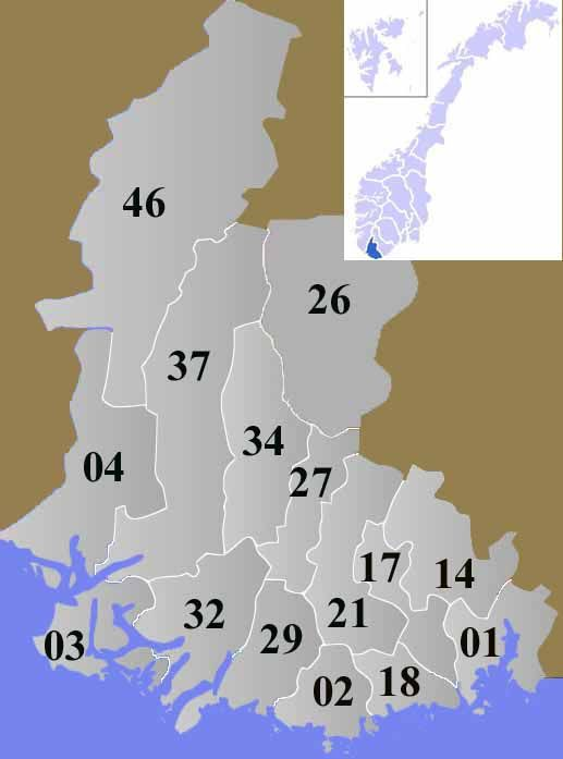 Vest-Agder Fylke has 15 Municipalitys,Put 10 in front of the nr on the map and you have the official nr of that Municipality.Vest-Agder Fylke har 15 kommuner.10 foran nr på kartet gir det offesielle kommunenr.(td har den sørlegste kommunen Lindesnes nr 1029).(10 er Vest-Agder Fylke sitt nr)